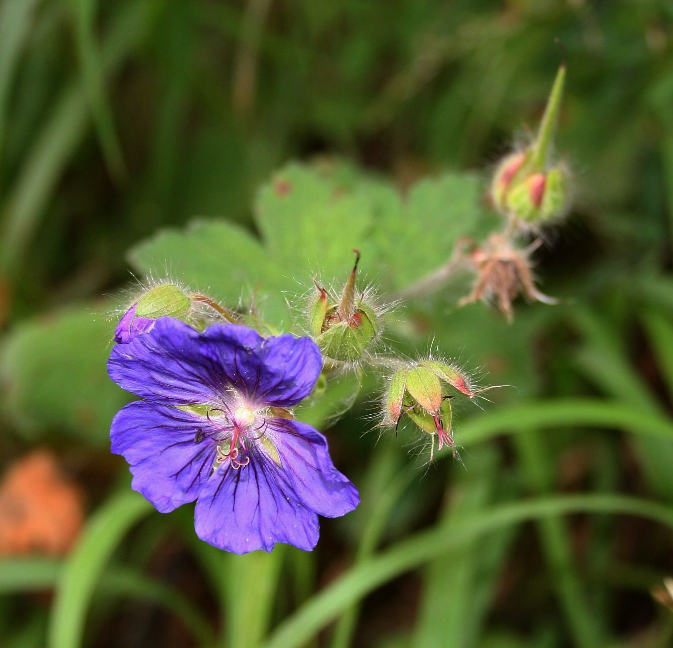 Geranium platypetalum, Storchschnabelgewächse (Geraniaceae) – Georgien/საქართველო: Kleiner Kaukasus, an der Straße zum Tskhratskaro-Pass, ca. 5 km SW Bakuriani/ბაკურიანი, ca. 1945 m s.m.